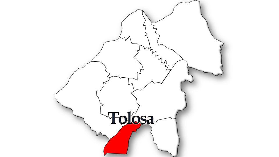 Evolução da População